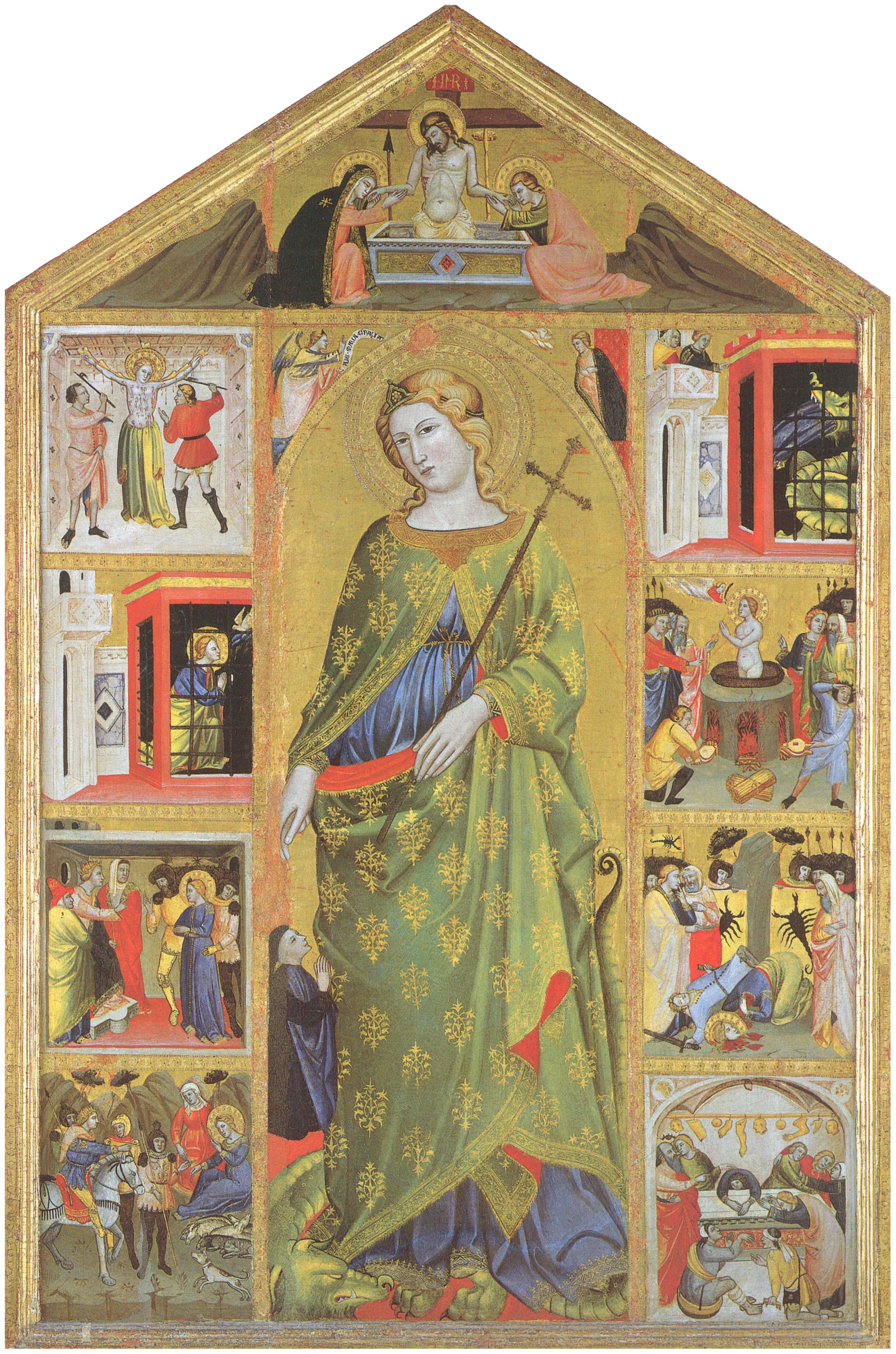 Vanni, Turino 166 × 106,7 cm Olio su tempera Roma Pinacoteca Vaticana